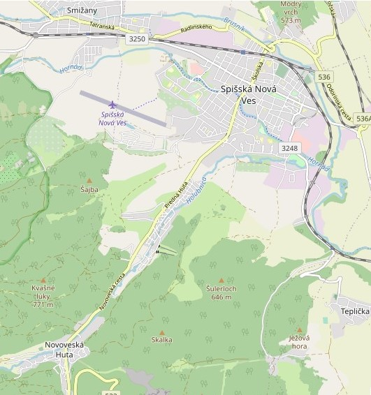 This map may be incomplete, and may contain errors. Don't rely solely on it for navigation.